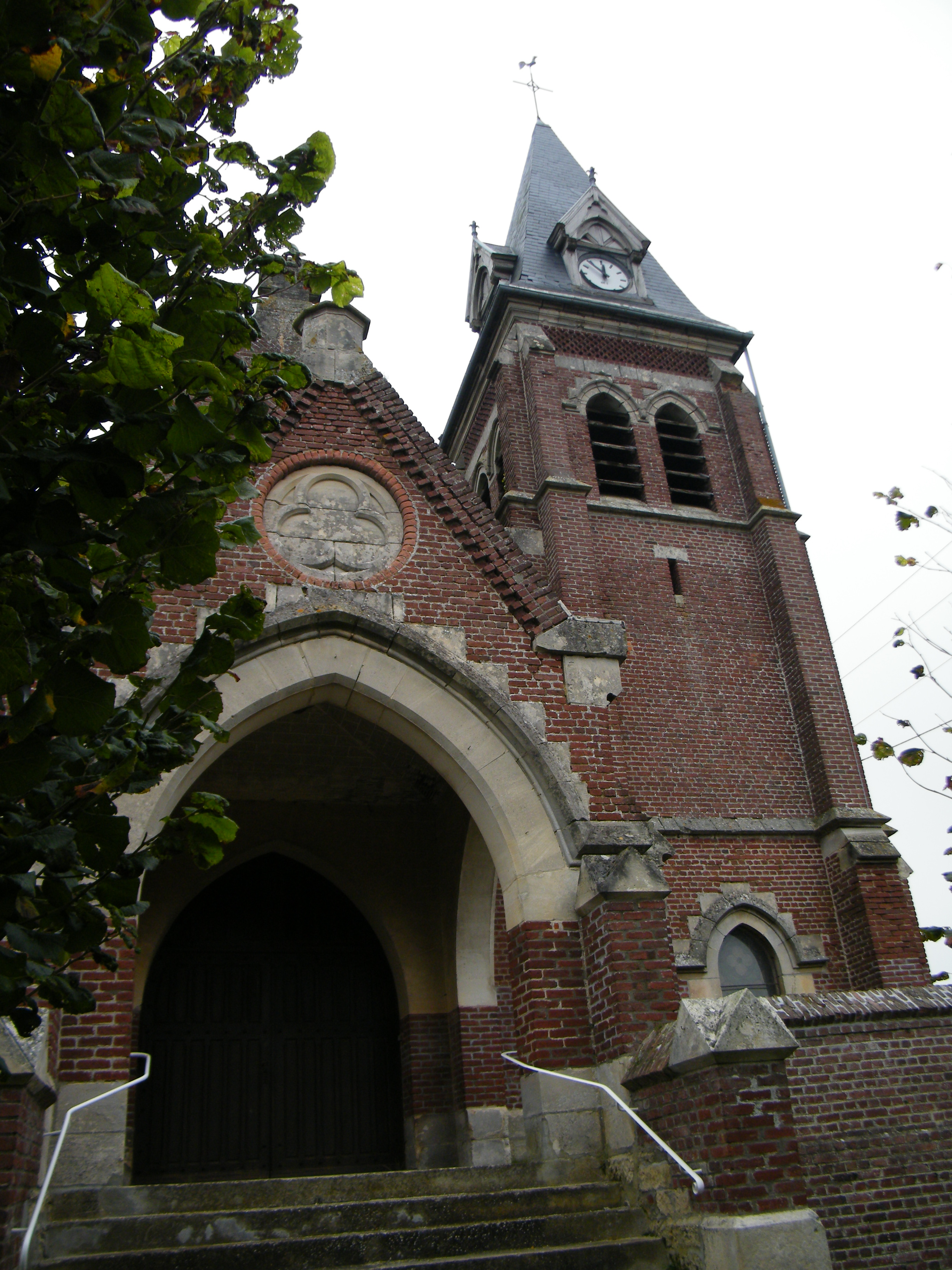 église.